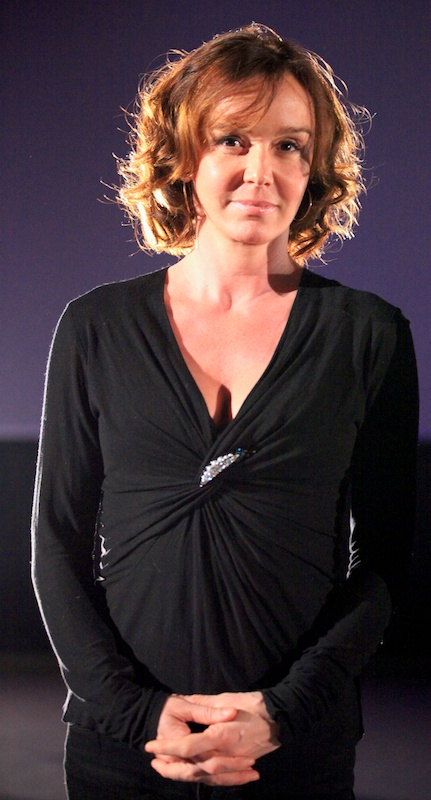 Philippine Leroy-Beaulieu au Festival international du film d'amour de Mons 2011.